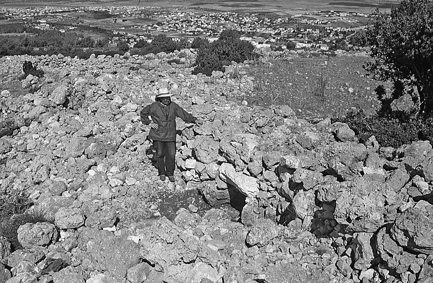 אל-אחוואט הוא אתר ארכאולוגי מתקופת הברזל הממוקם בשומרון ליד היישוב קציר מראה כללי של חומת העיר ו"קורידור" טיפוסי (למרגלות האדם שבתמונה). ברקע בתי כפר קרע